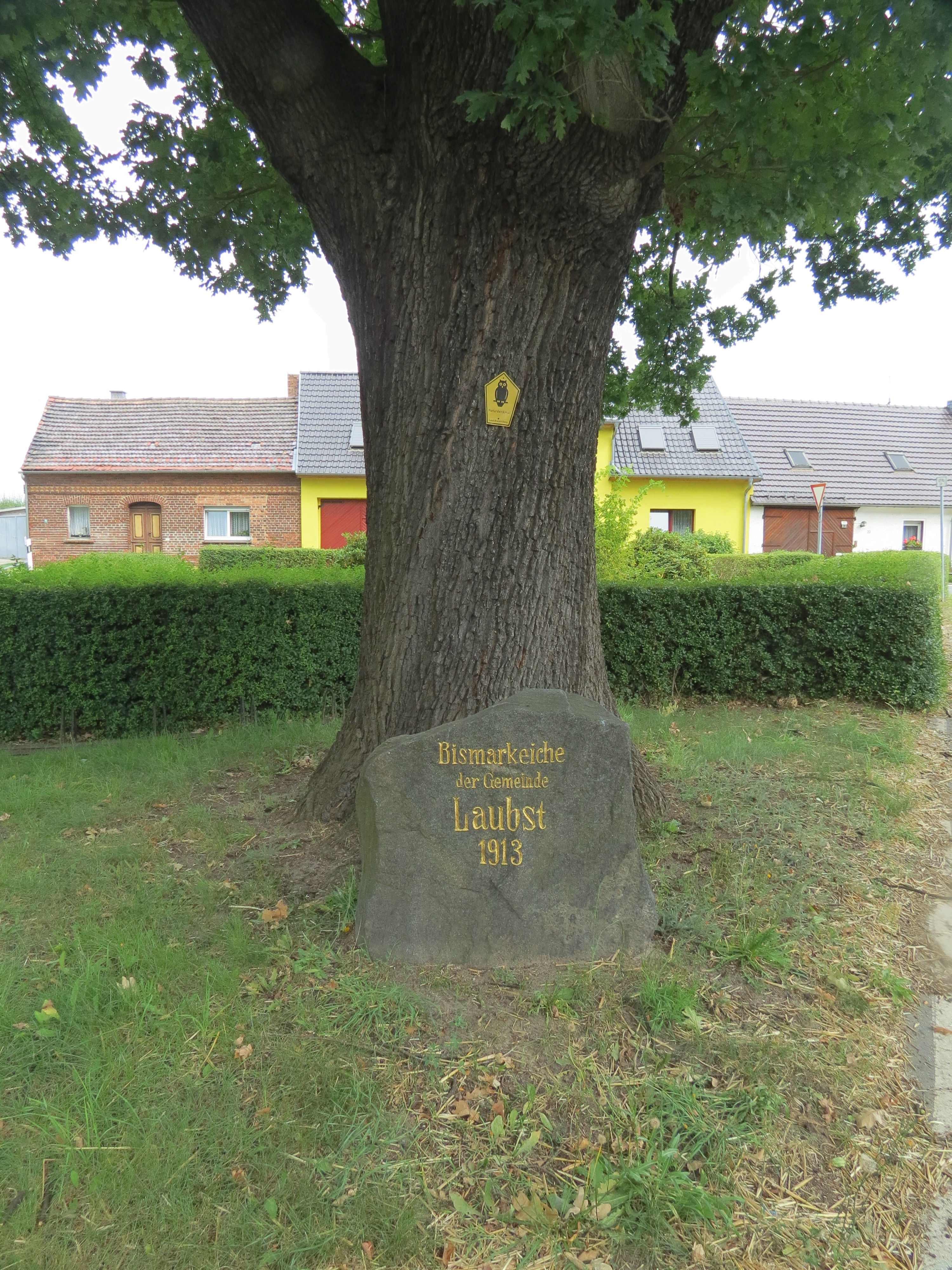 Naturdenkmal Stieleiche von 1913 auf dem Dorfanger, Laubst, Ortsteil der Stadt Drebkau, Landkreis Spree-Neiße, Brandenburg